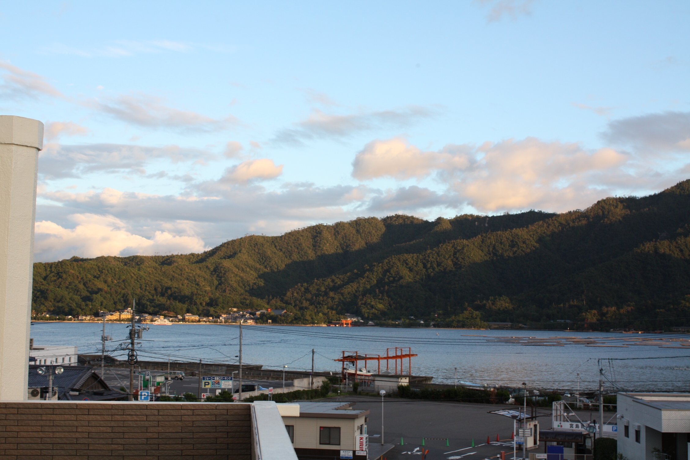 厳島をSimpleStay宮島４階より撮影